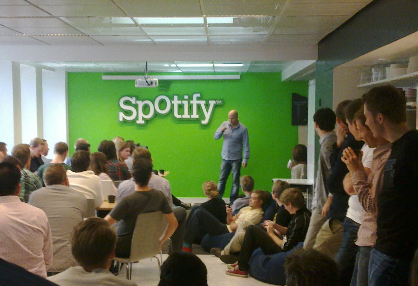 Daniel Ek addressing Spotify staff.